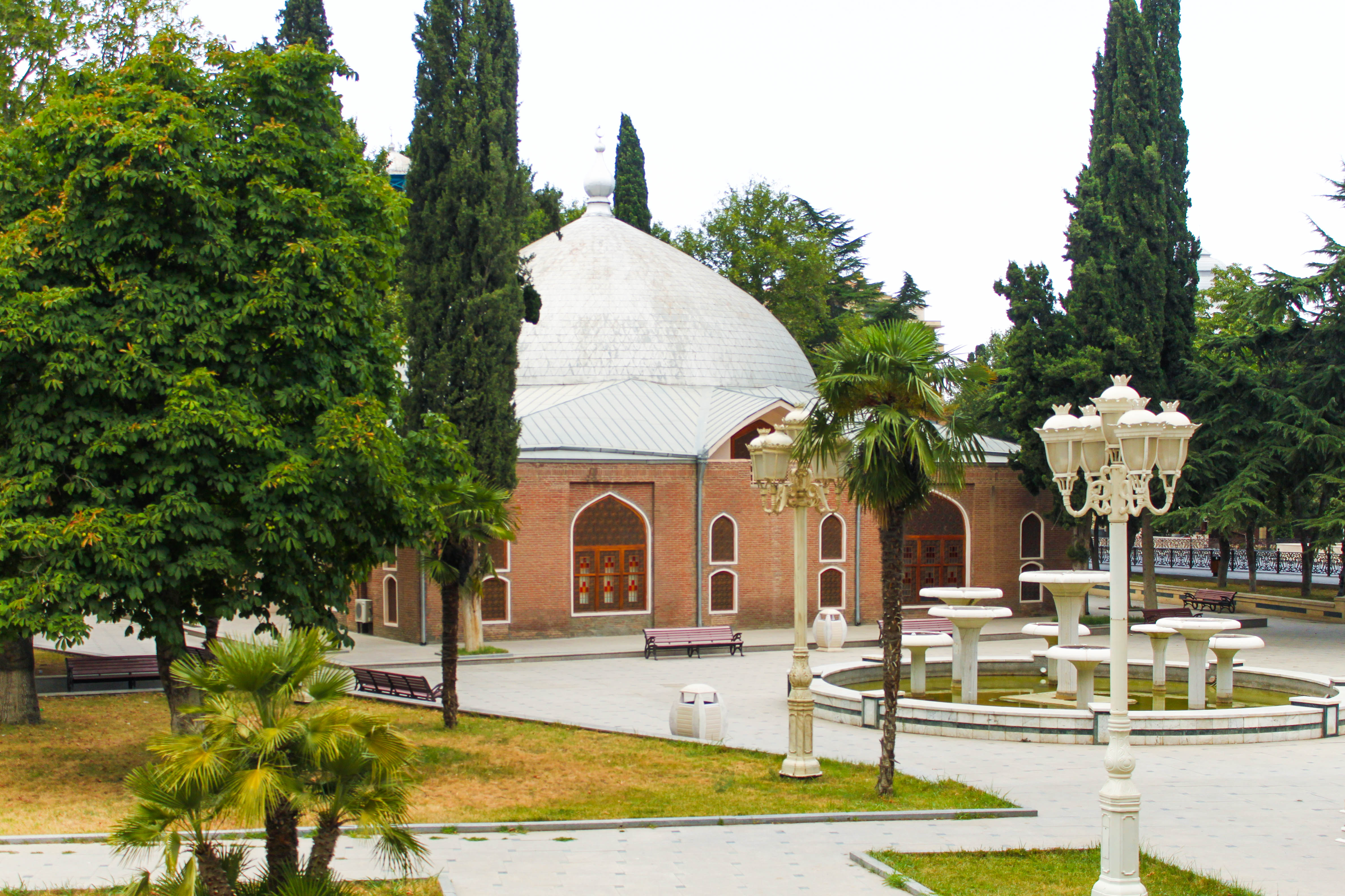 Ganja Juma mosque 2018